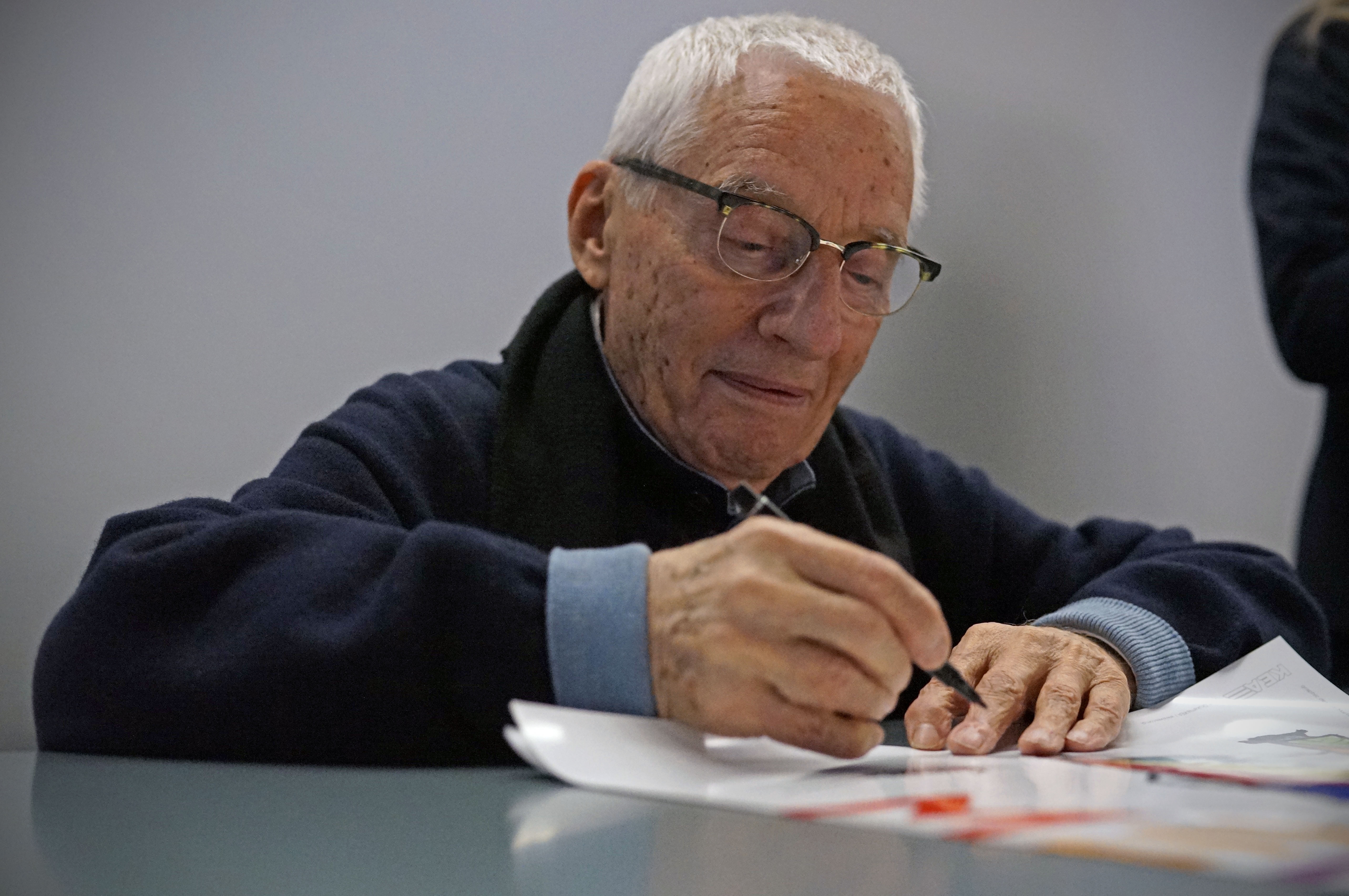 Alessandro Mendini na ASP we Wrocławiu, grudzień 2014.